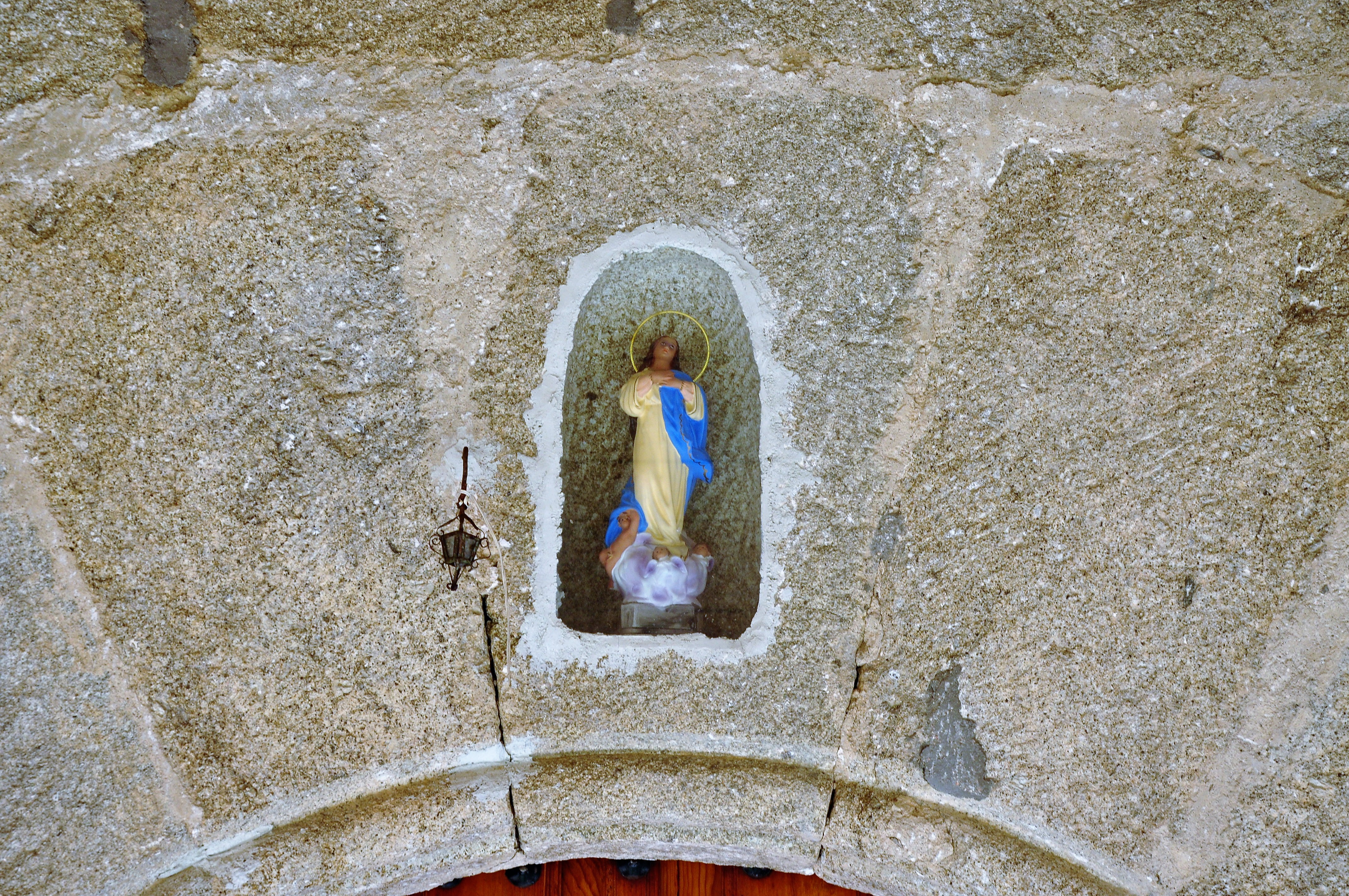 Virgen en Collado del Mirón, Ávila, España